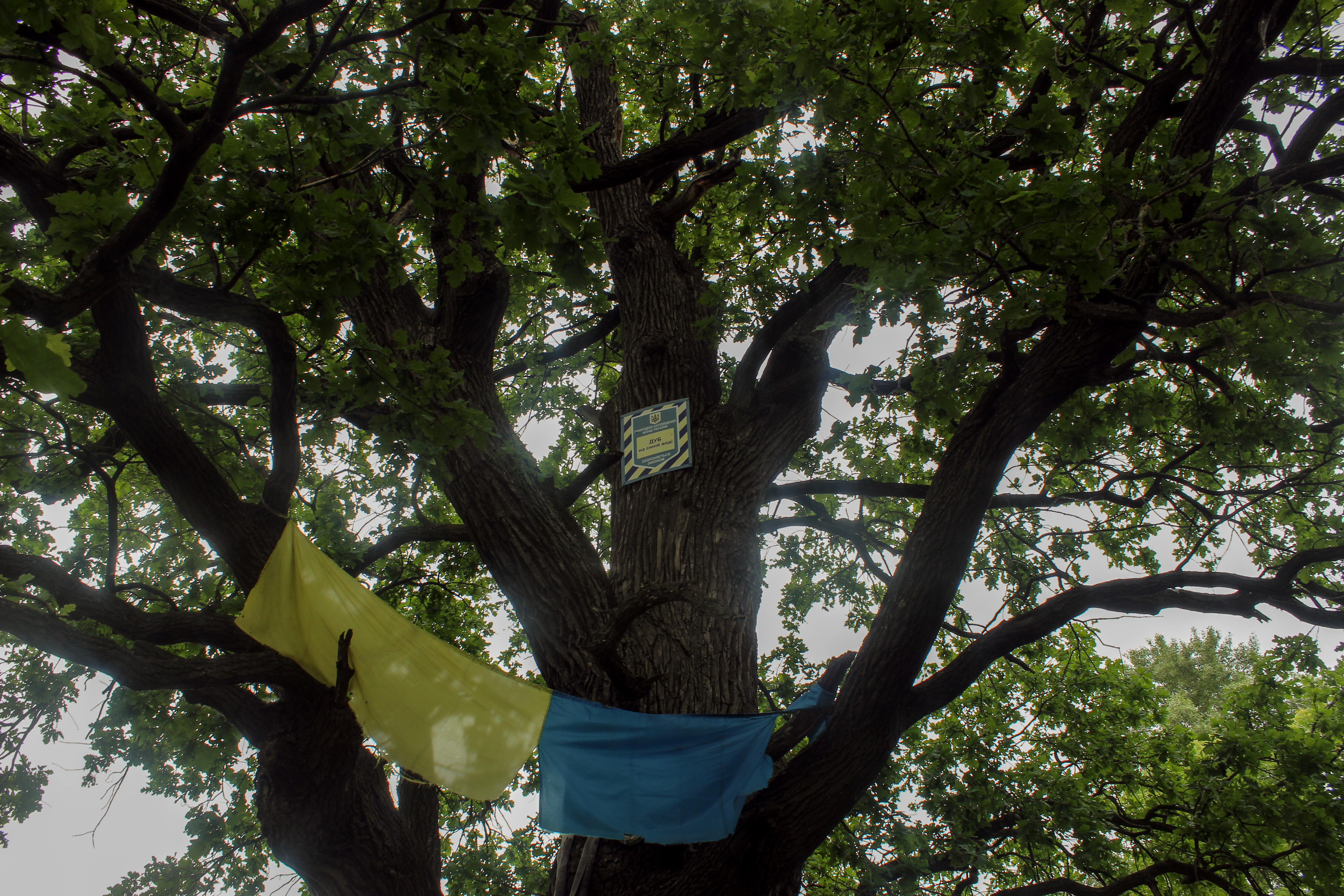 Дуб на синій воді, Голосіївський район, в межах ландшафтного заказника «Жуків острів» Найпівнічніша точка острова на р. Віта. Дорога з вул. Лісничої у напрямку комплексу відпочинку «Маячок». Не переходити дамбу, в кінці якої дуб "Знак оклику", а звернути вліво на грунтівку і йти до кінця острова.